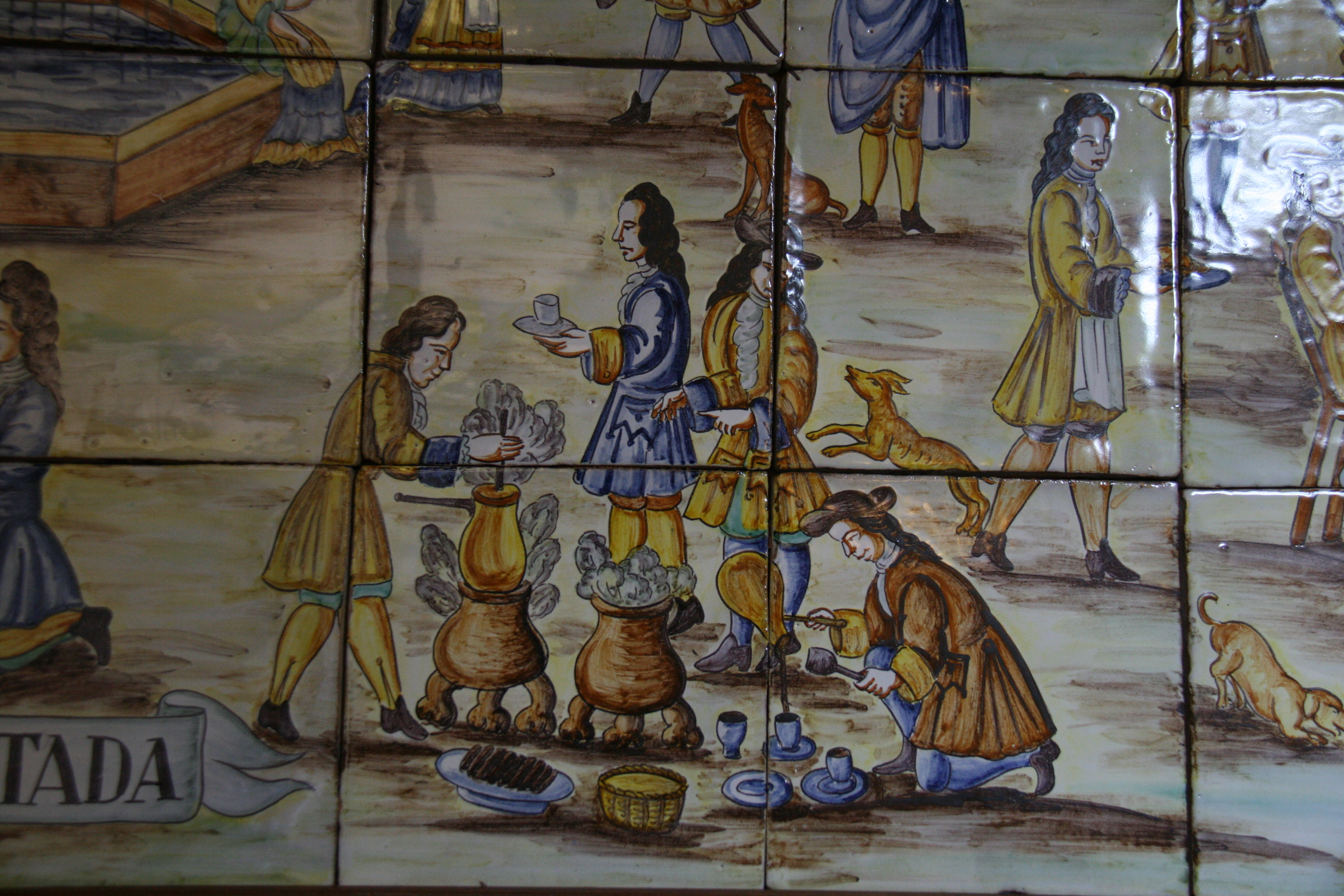 Xocolatada (Chocolatada)